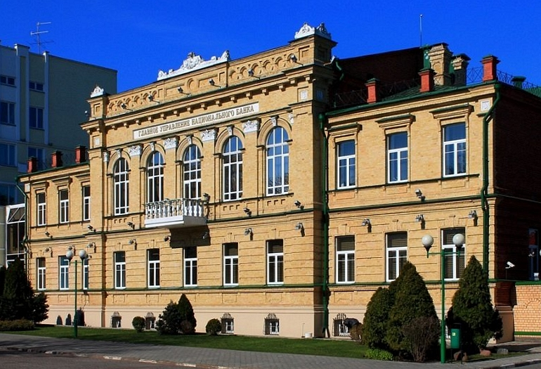 філіял Маскоўскага міжнароднага банка